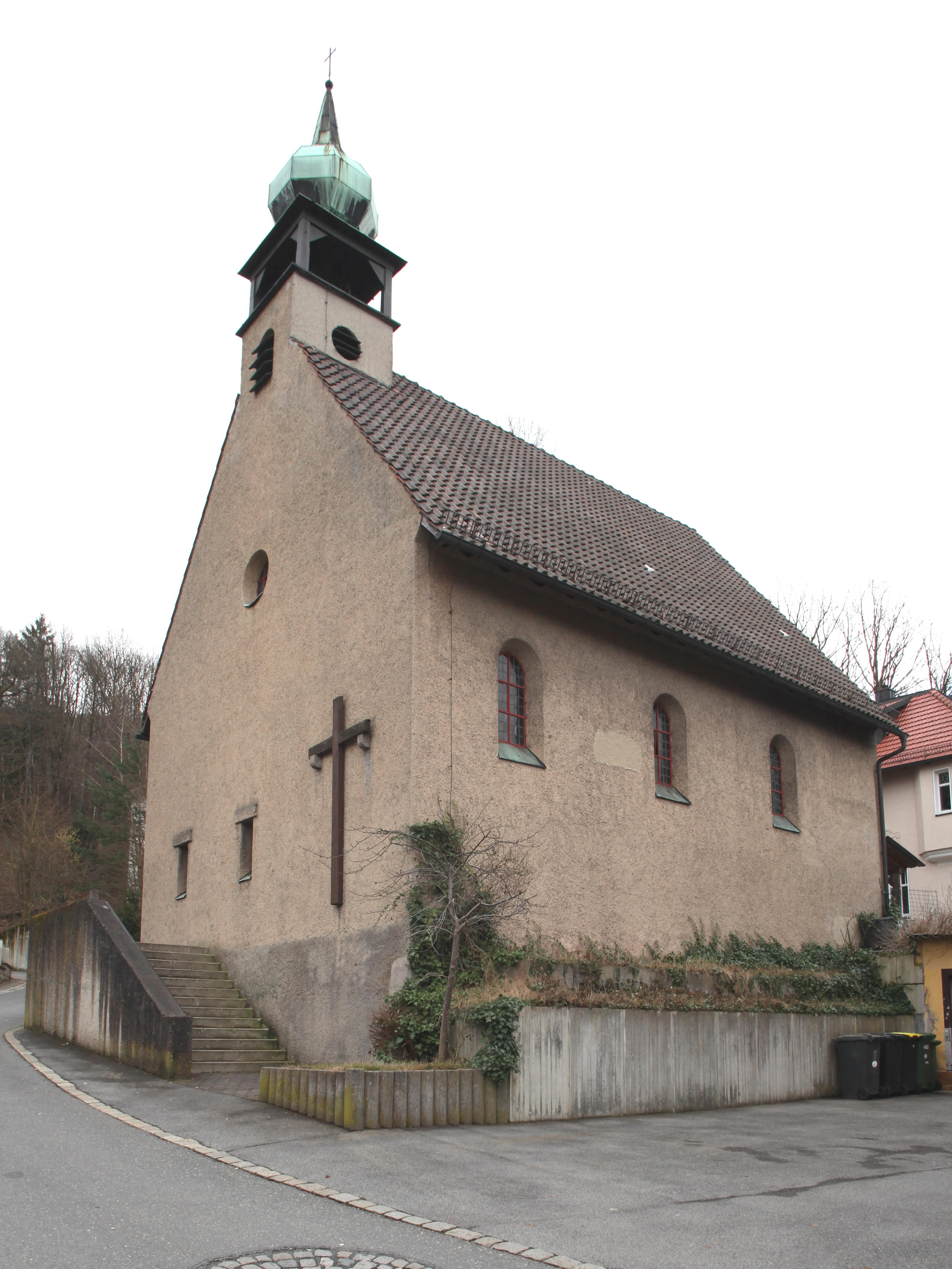 Neustadt bei Coburg, Gabelsbergerstr 2a, Katholische Kapelle St. Ottilia